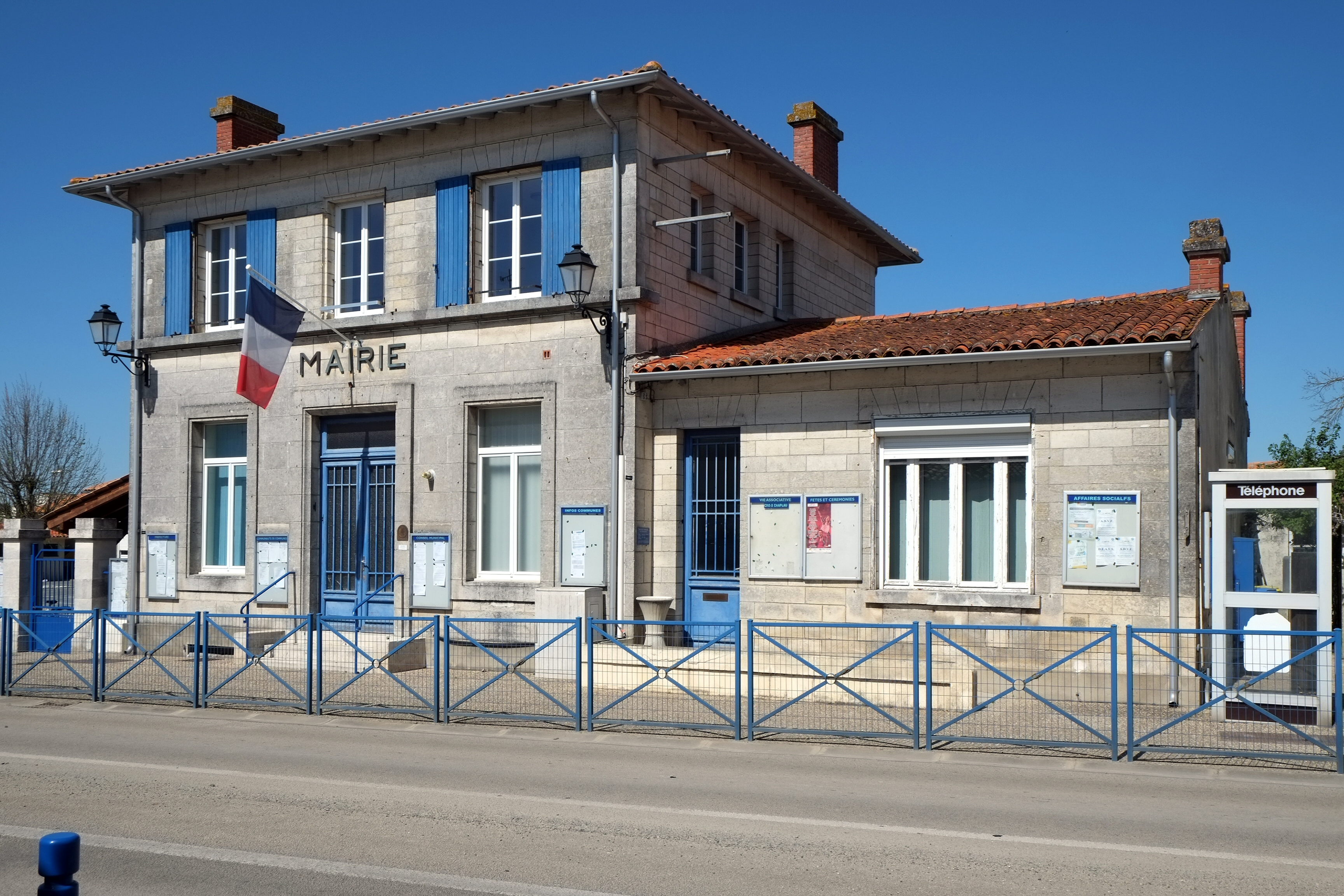 Mairie Croix-Chapeau Charente-Maritime France